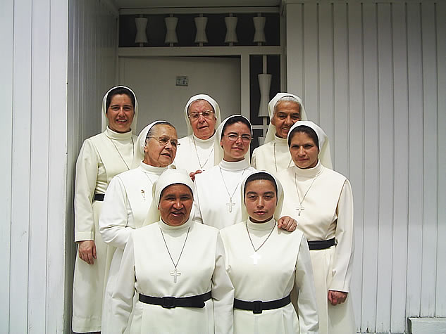 Agustinas Recoletas de los Enfermos